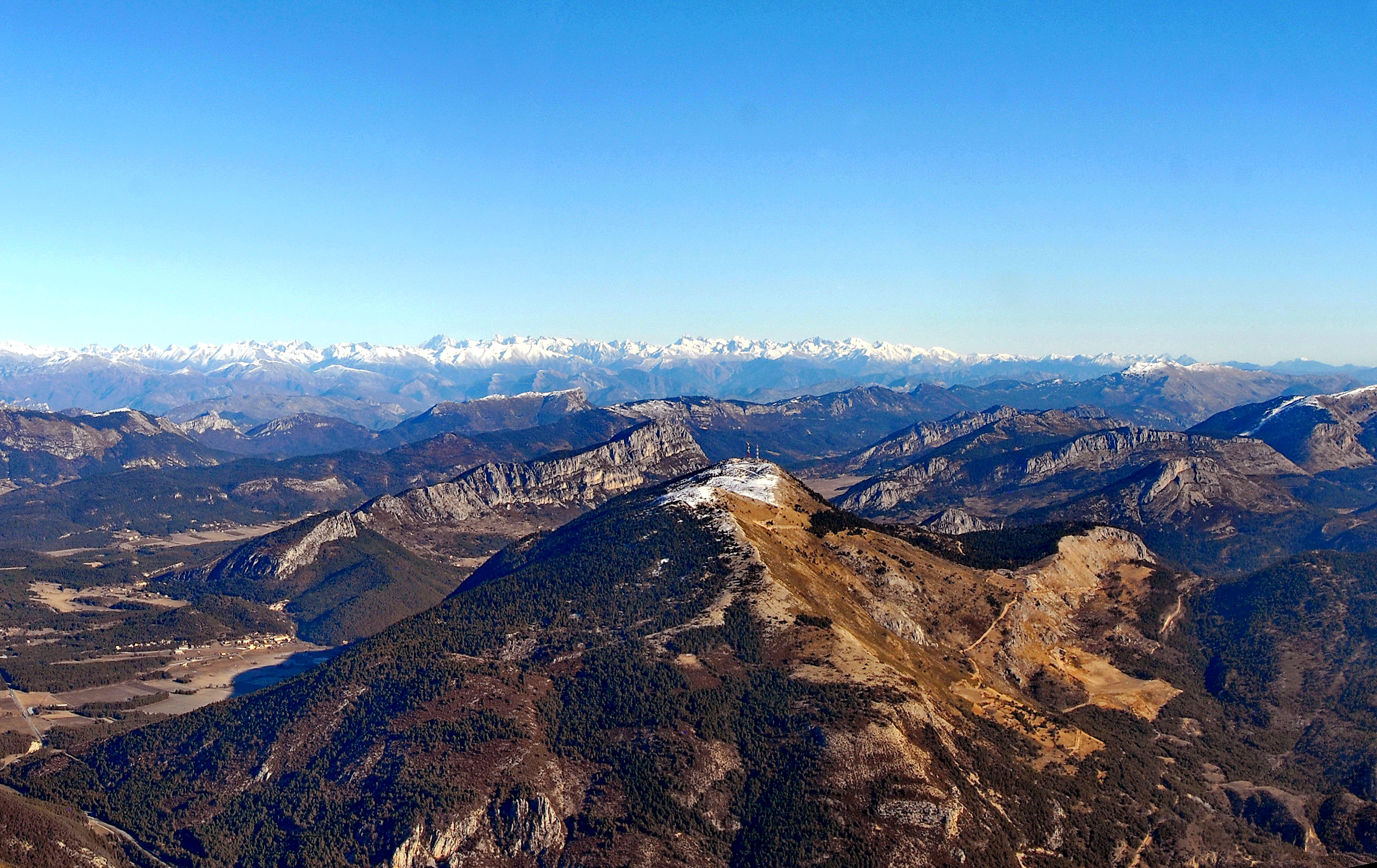 Montagne de Lachens (laChance), le plus haut sommet du Var, situé sur les communes de Mons, La Bastide et Séranon, site militaire déclassifié